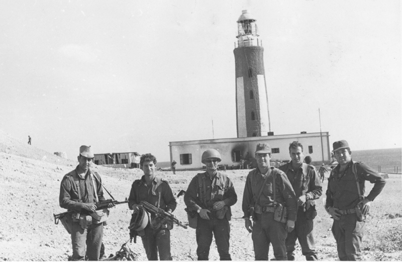 מבצע-רודוס - כיבוש האי שדואן. חיילי דובדבני, ביניהם עמוס ירון, על רקע המגדלור סגל הבא"ח. מקום הצילום: שדואן.